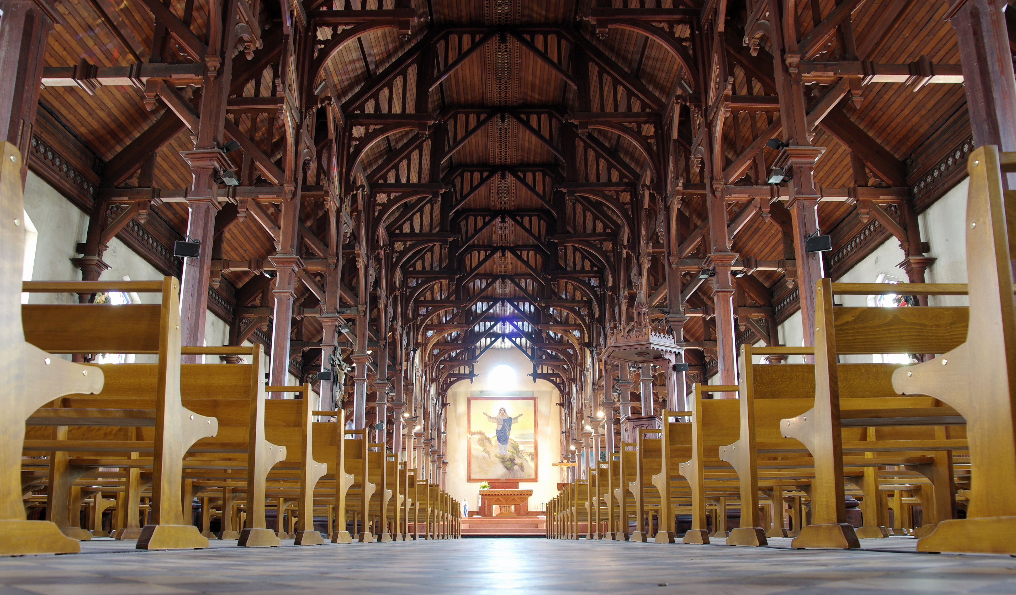 La nef de l'église Notre-Dame-des-sables à Berck plage.